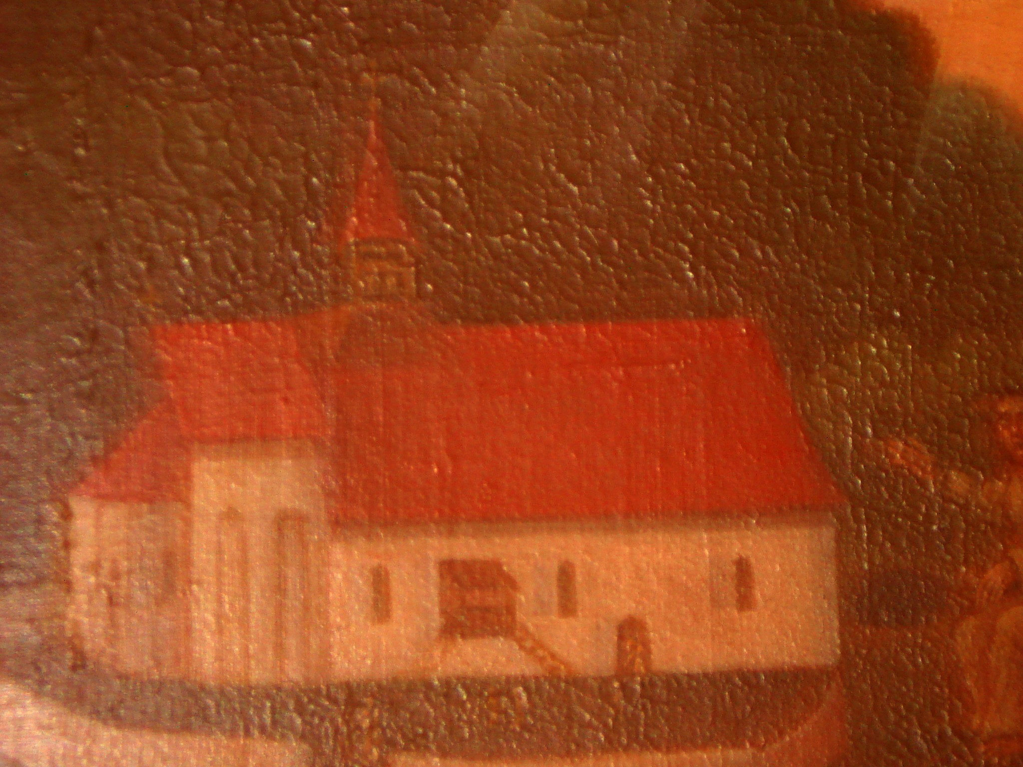 Thierenbach : Détail de l'ex-voto de la commune de Soultz (1680) montrant l'aspect du prieuré à l'époque